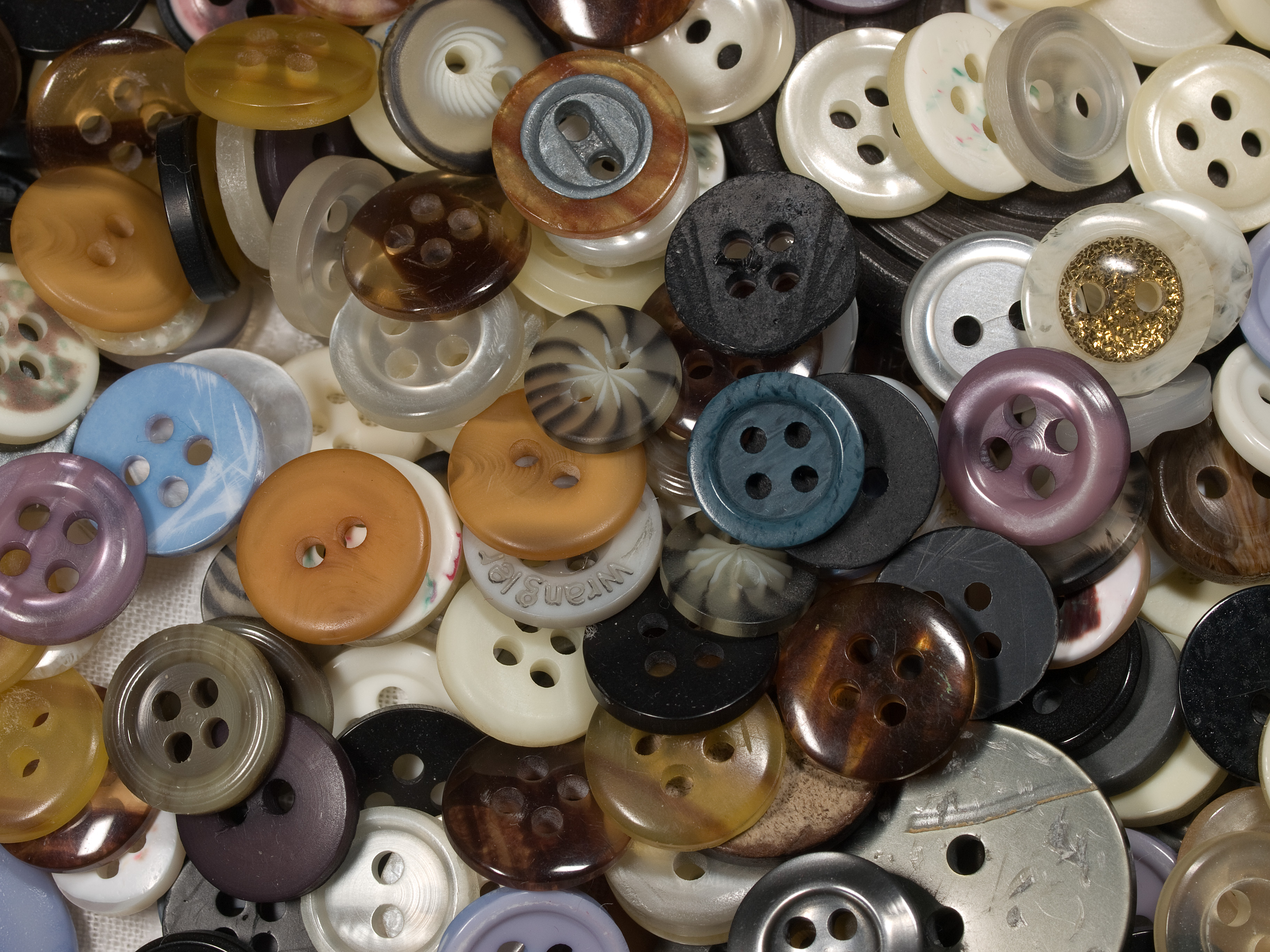 Knöpfe, Buttons